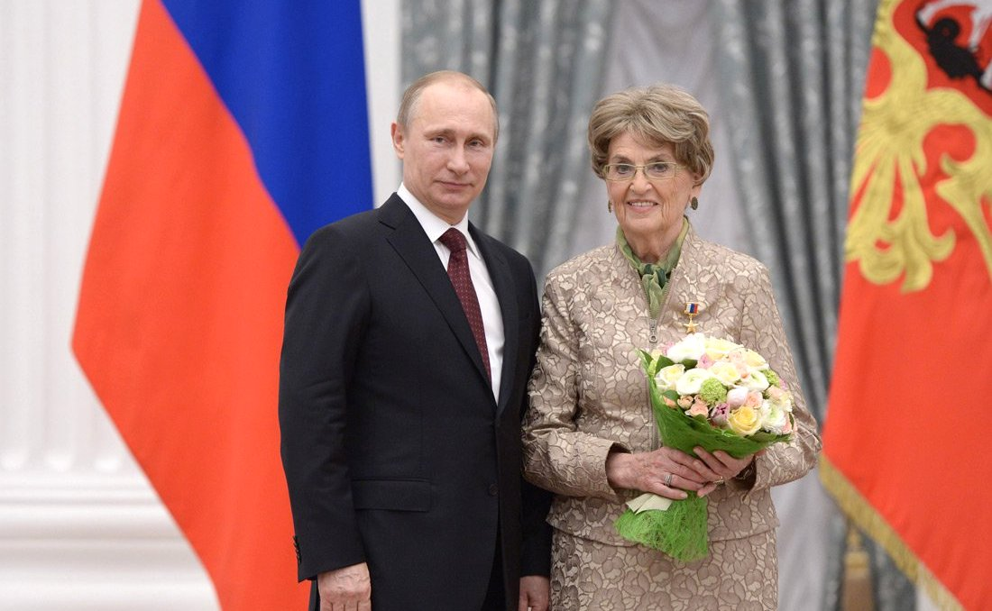 Москва, Кремль. 1 мая 2014 года. Церемония награждения Героев Труда Российской Федерации. Званием Героя Труда РФ награждена искусствовед и деятель культуры Алиса Аксёнова